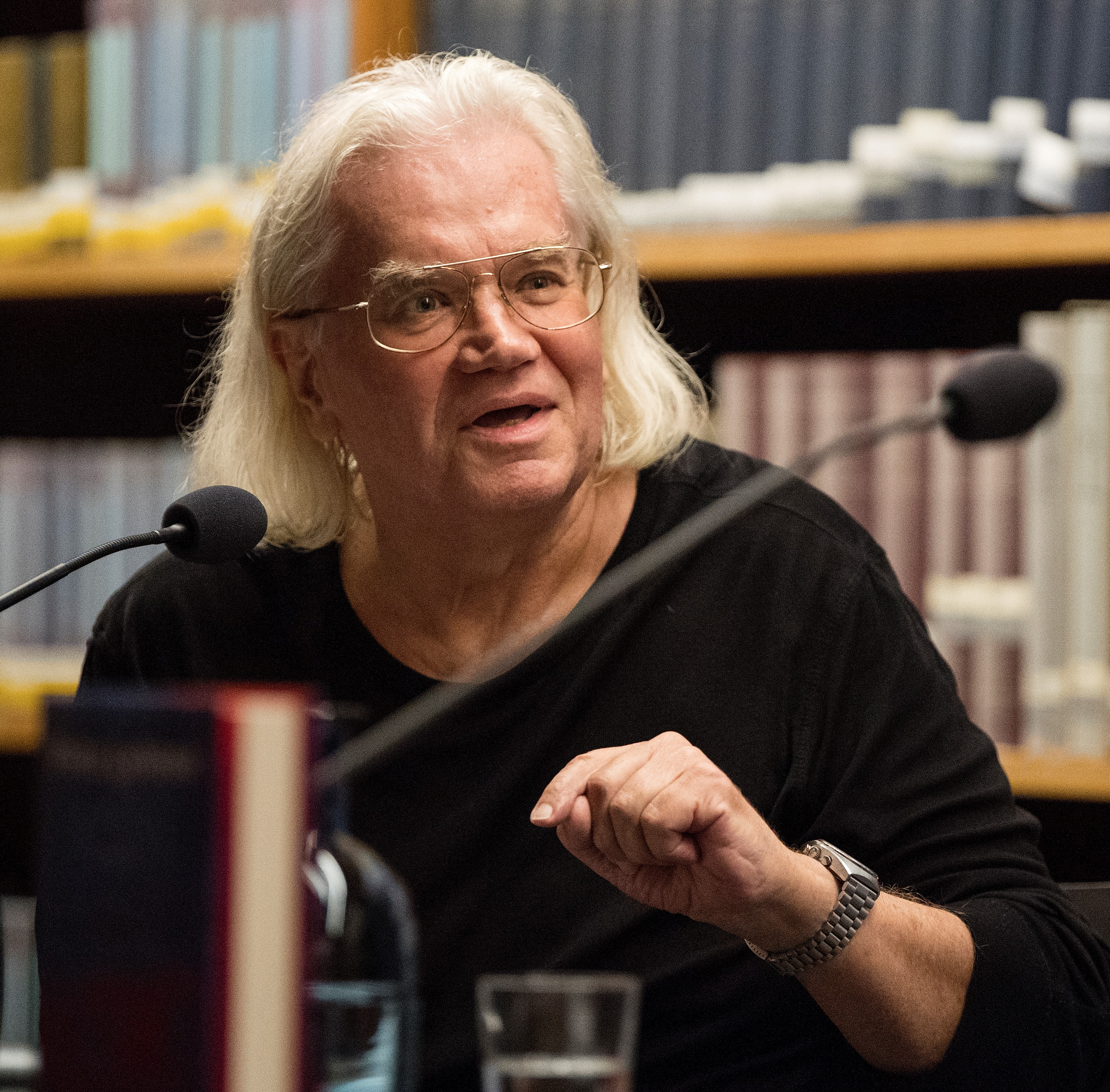 Foto von Fritz Lehner anlässlich des Leo-Perutz-Preises, 2018 © HVB / Isabelle Grubert